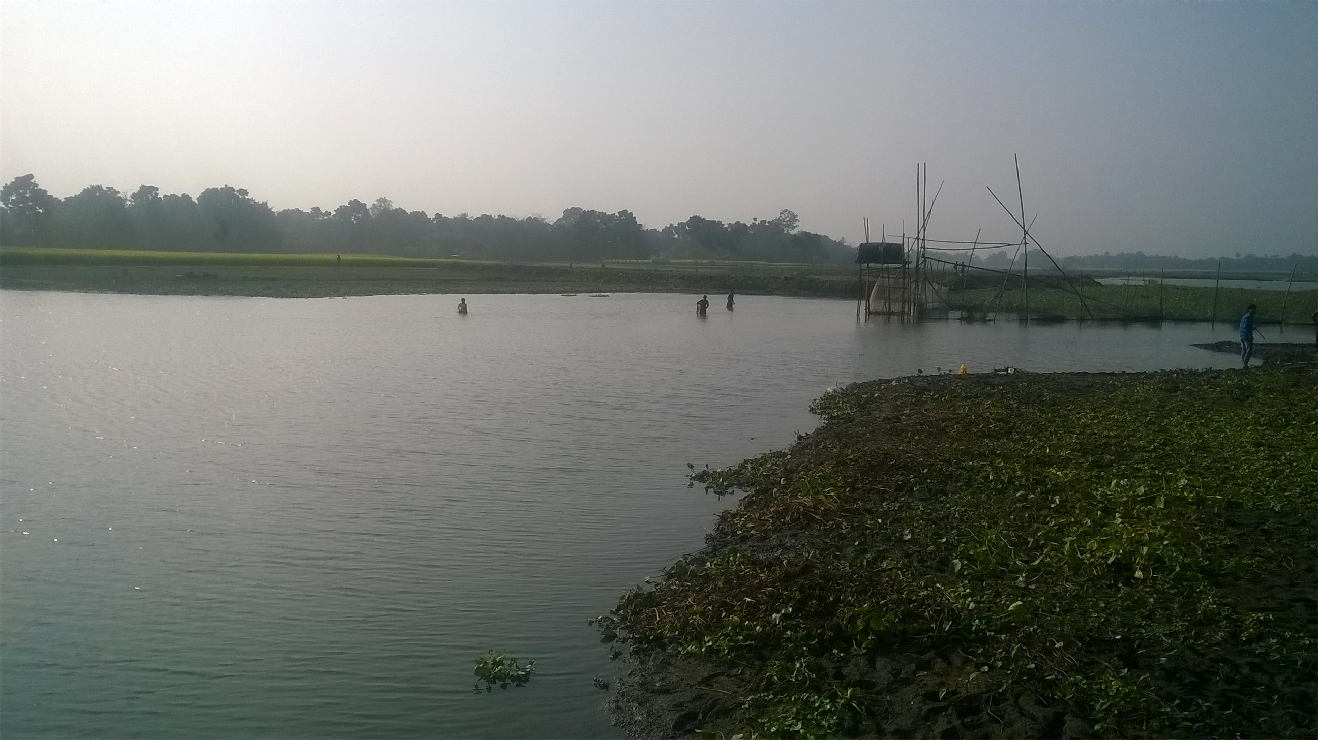 শুখা মরশুমে চৈতা নদীতে জলের পরিমান